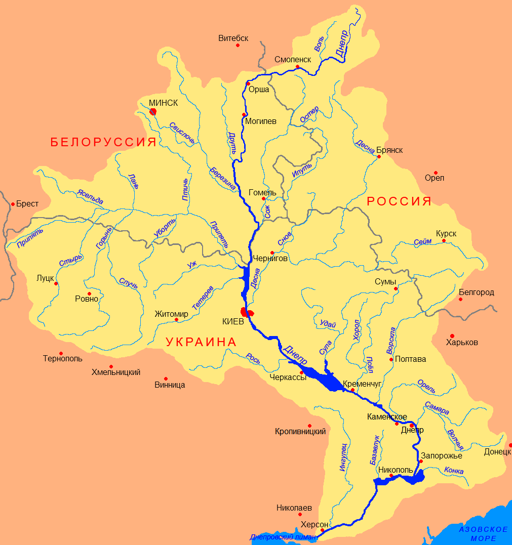 Схема бассейна реки Днепр